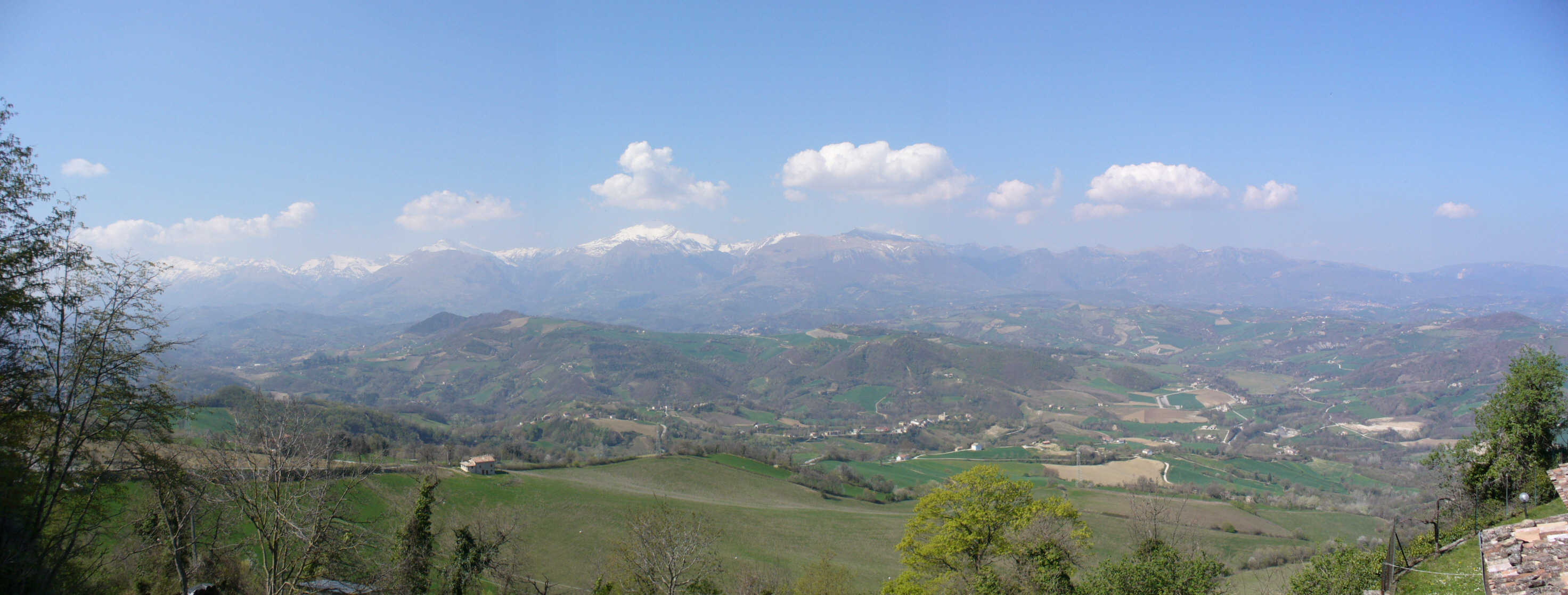 Foto del Parco Nazionale dei Monti Sibillini fotografato dalla porta sud a Smerillo. Original (2944 x 1118)